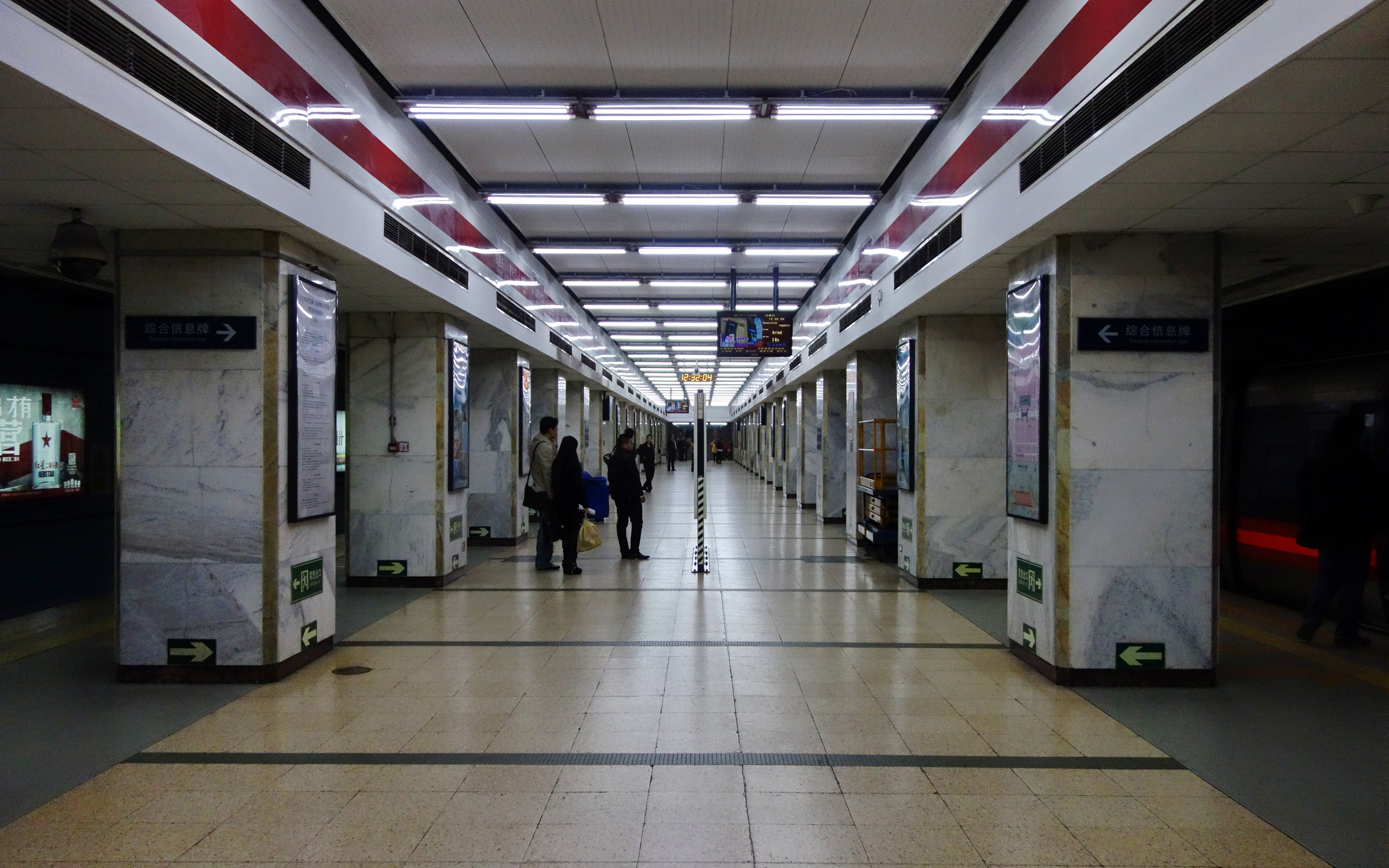 北京地铁1号线军事博物馆站站台